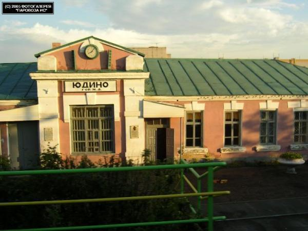 Чётный вокзал ст. Юдино, Горьковская ж.д., г. Казань, 2005 г.